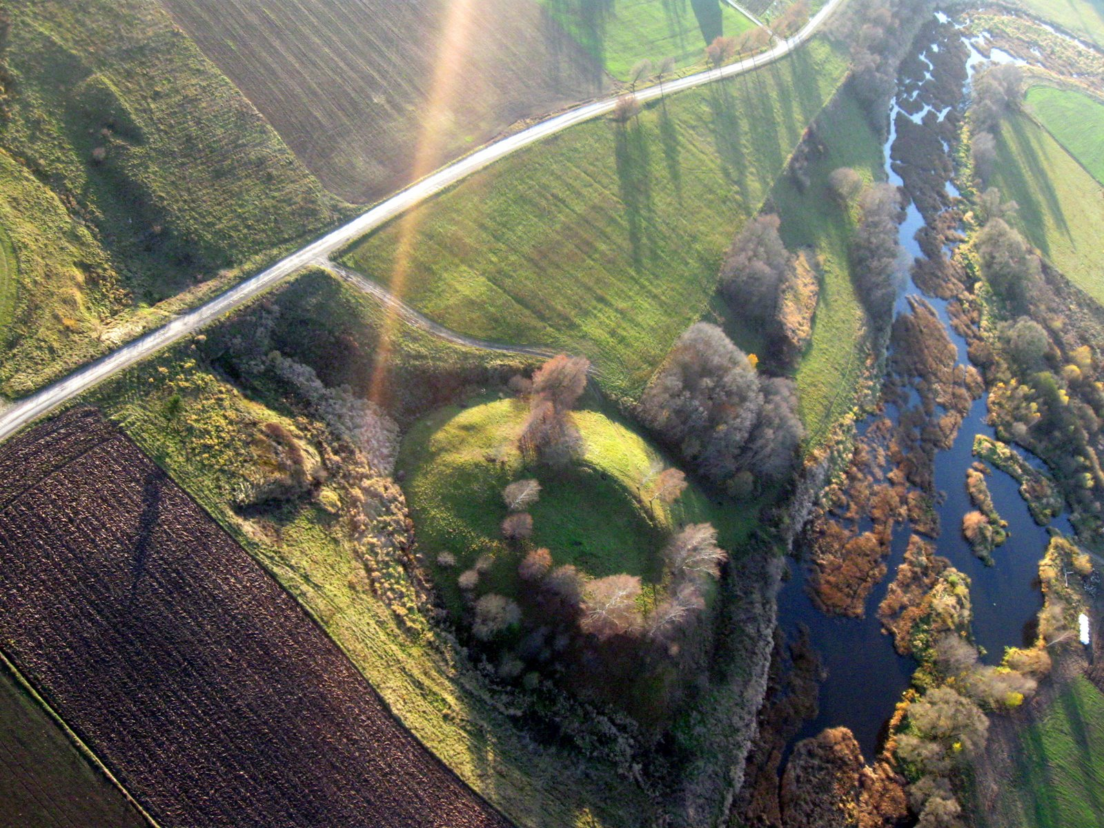 Migonių piliakalnis. Fotografuota 2008-11-02